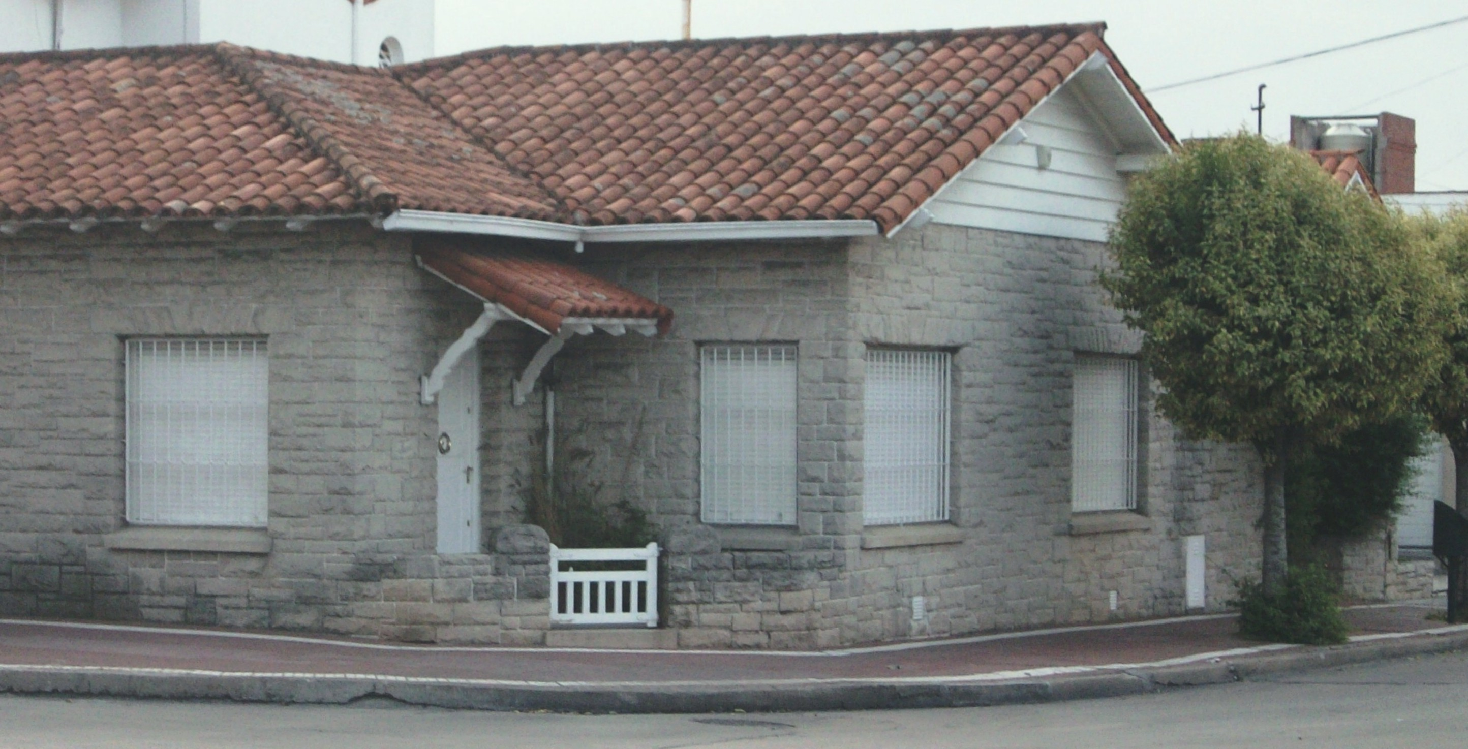 Mar del Plata style chalet